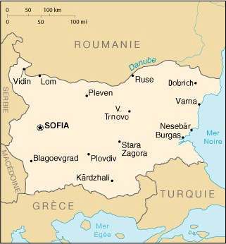 Carte de la Bulgarie - origine CIA World Factbook